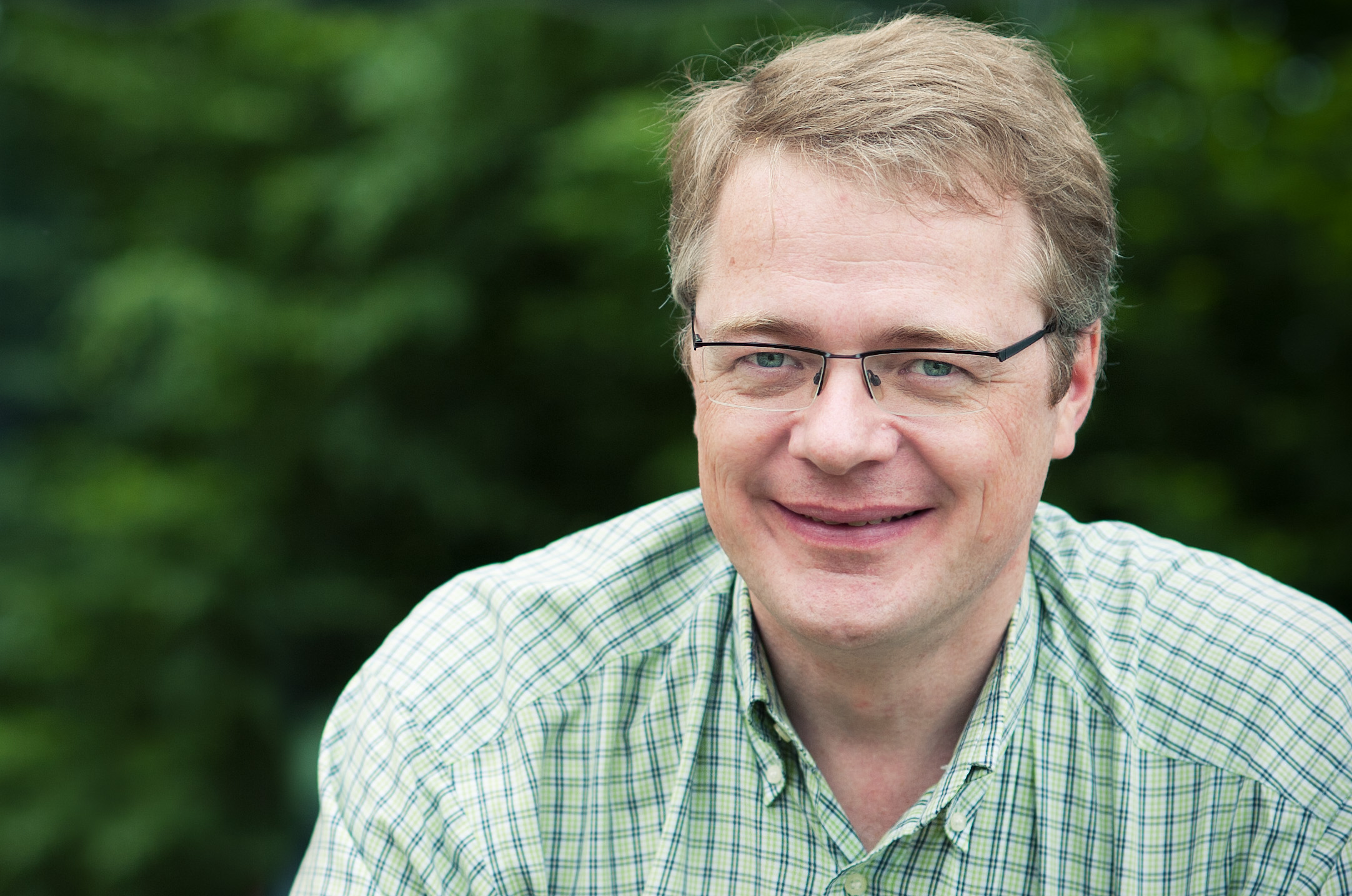 Prof. Lutz Feld, aufgenommen am 04.07.2012 vor dem Physikzentrum der RWTH Aachen